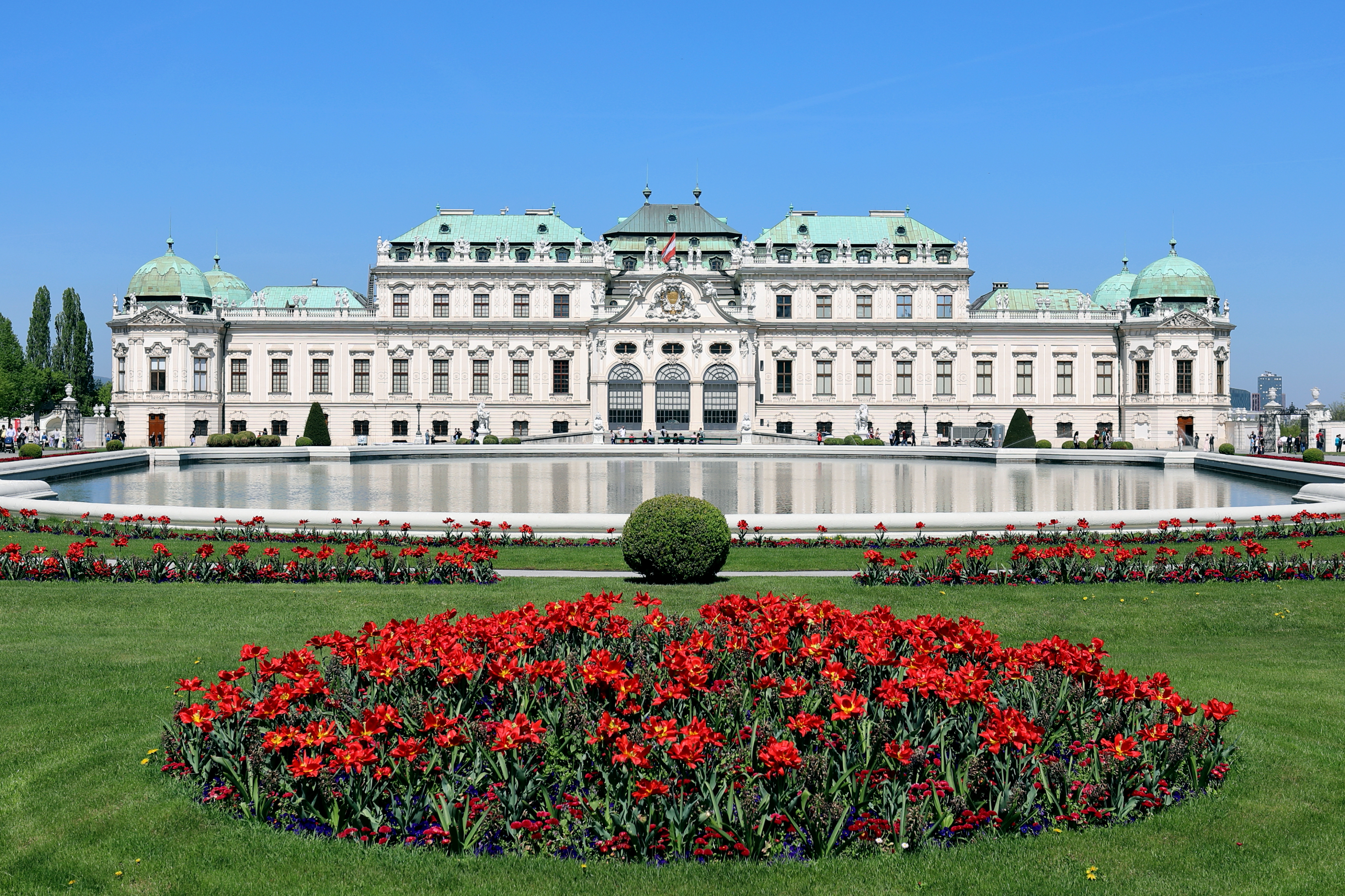 Südansicht des oberen Belvederes im 3. Wiener Gemeindebezirk Landstraße.Die barocke Schlossanlage ließ Prinz Eugen von Savoyen nach Plänen von Johann Lukas von Hildebrandt errichten. Das obere Belvedere diente ihm als Repräsentations- und Festschloss und wurde von 1717 bis 1723 gebaut. Zuvor ließ er von 1712 bis 1716 das untere Belvedere als Sommerwohnsitz errichten. Aktuell (2018) wird das untere Belvedere als auch das obere von der Österreichischen Galerie Belvedere genutzt.